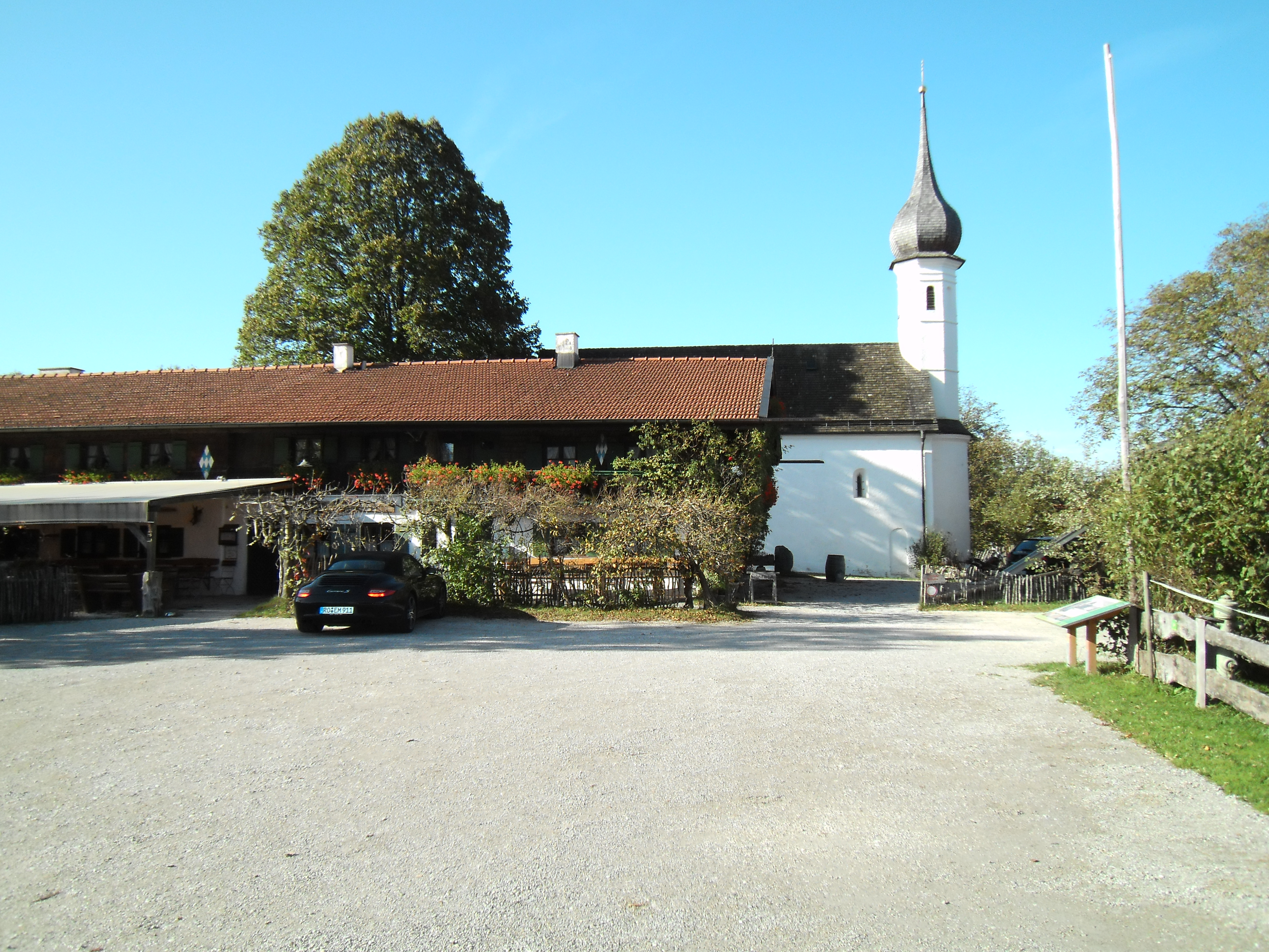 Urschalling (Gemeinde Prien am Chiemsee, Obb.), Traditionsrestaurant "Mesner Stub'n" mit Biergarten, dahinter die Dorfkirche St. Jakobus.